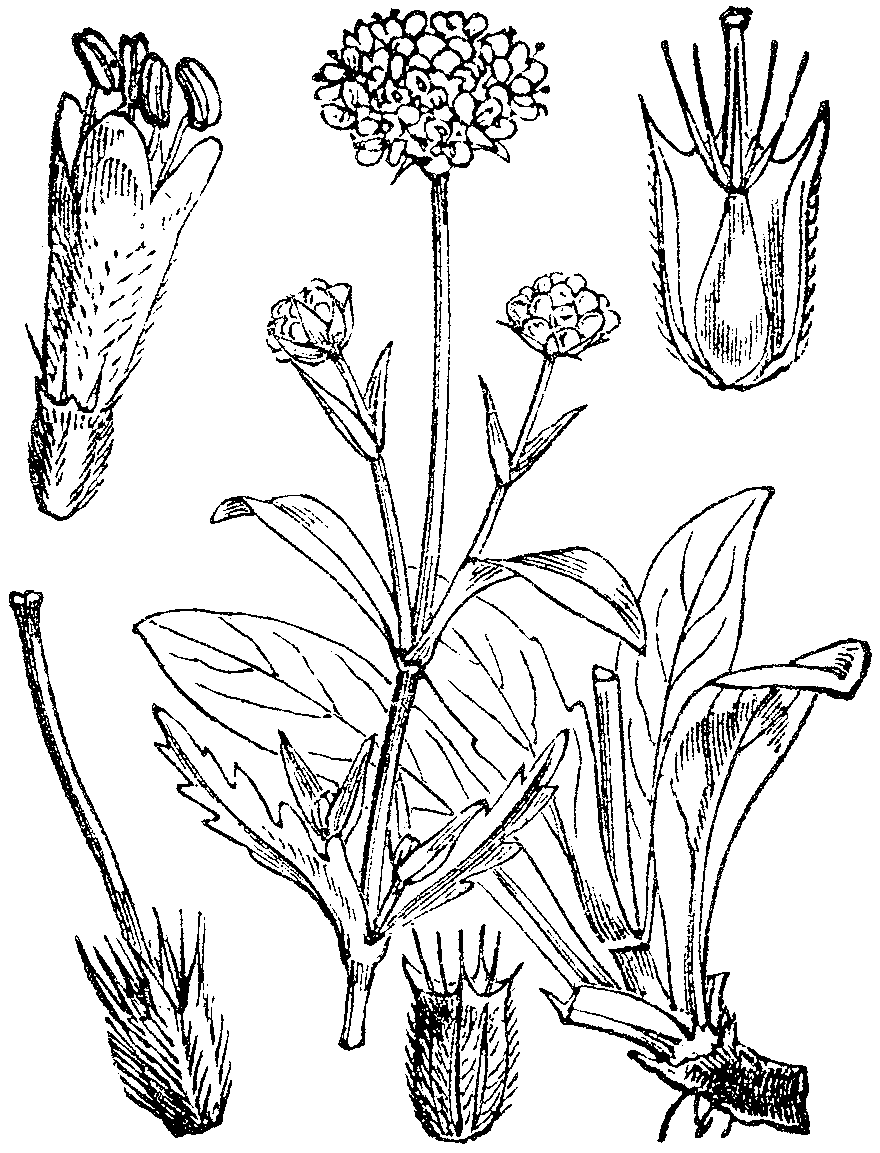 Slika 444. Modri gríntovec. (Scabiósa succísa.) [sic!]